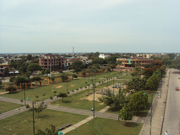 Parque El Resurgimiento